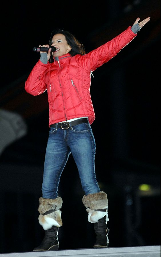 Biathlon World Championships